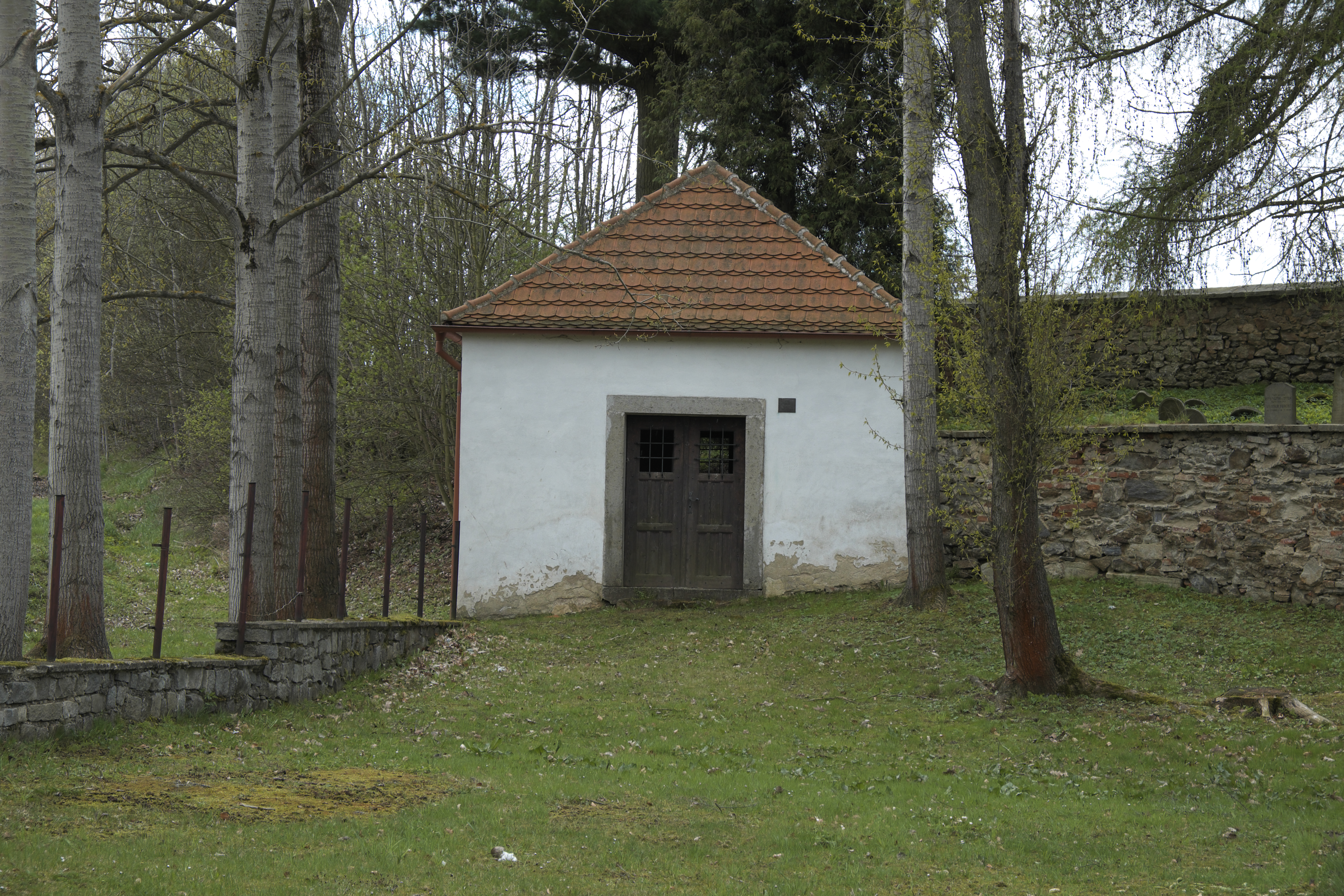 Jüdischer Friedhof in Třešť im Okres Jihlava in der Region Hochland (Kraj Vysočina, Tschechien)